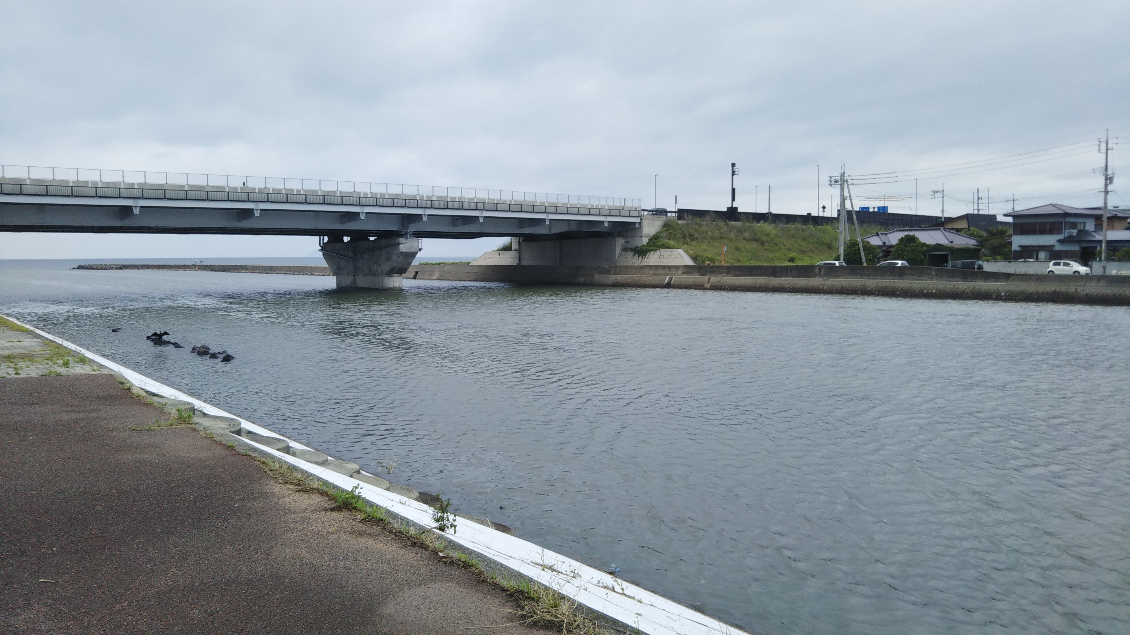 響灘に面している綾羅木川の最も下流の場所